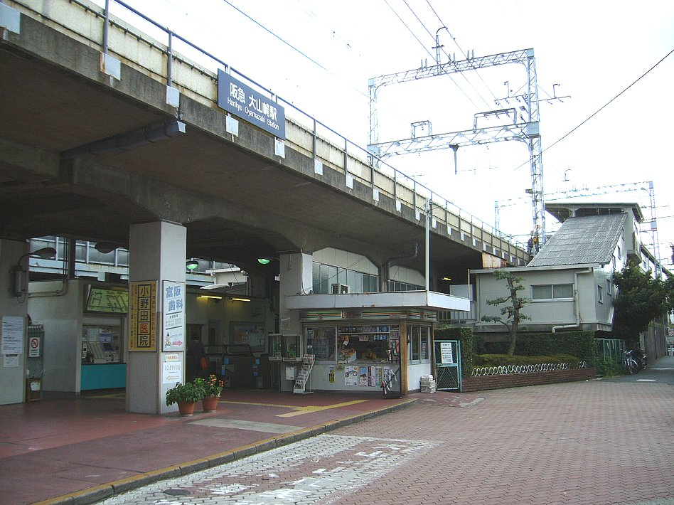 阪急京都本線ja:大山崎駅 南口